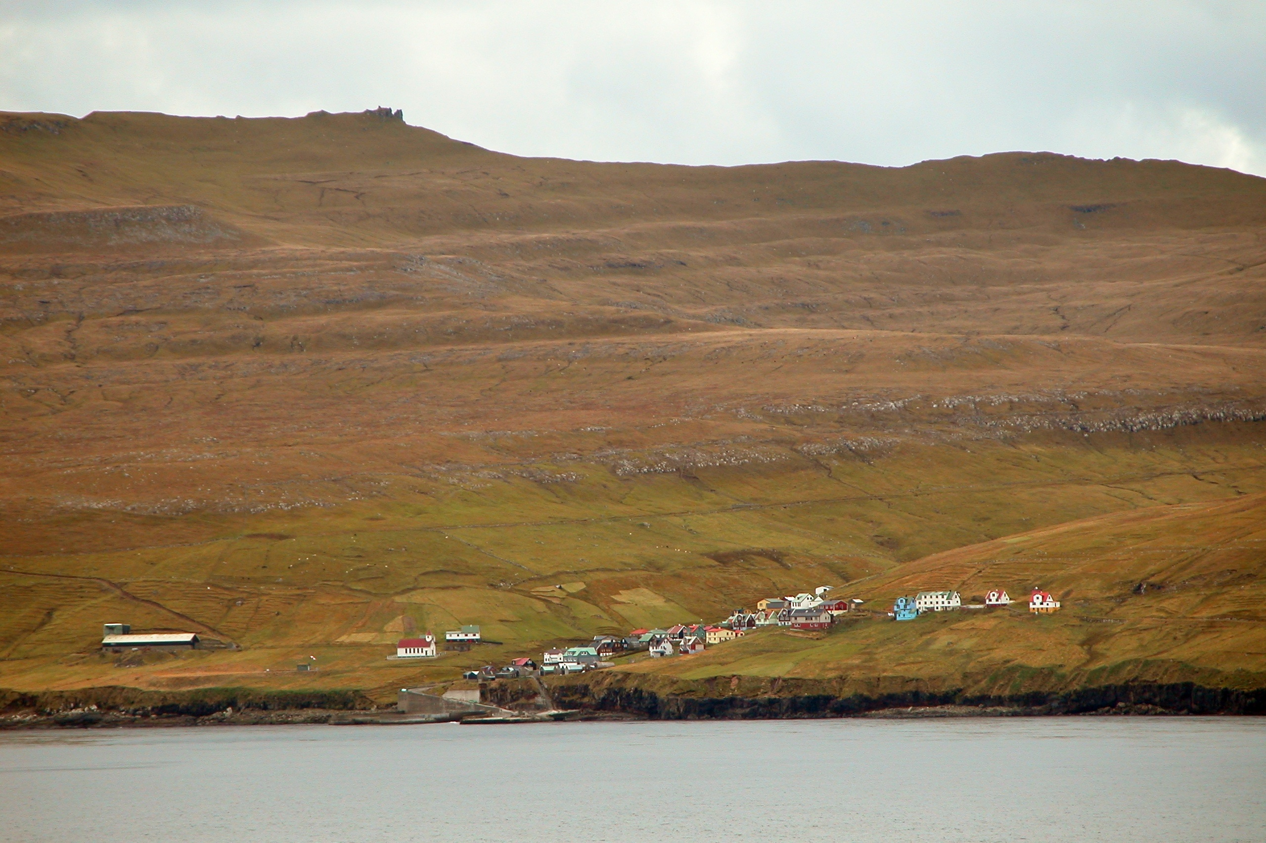 Skúvoy, Faroe Islands (view from Skarvanes)